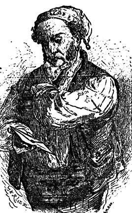 Illustration for La Fortune de Gaspard, a novel by La Comtesse de Ségur